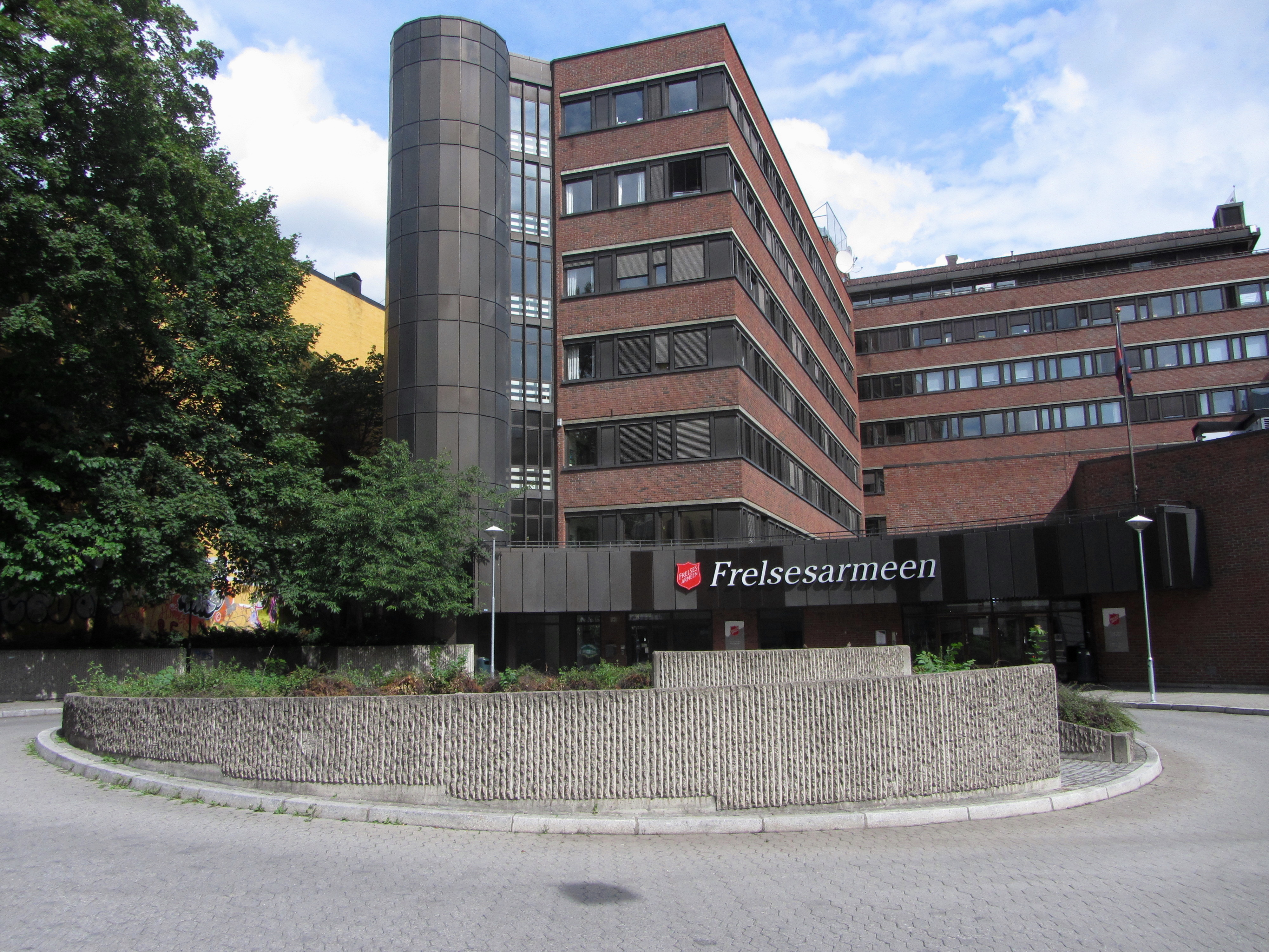 Frelsesarmeens hovedkvarter ligger på Kommandør T. I. Øgrims plass i Oslo.